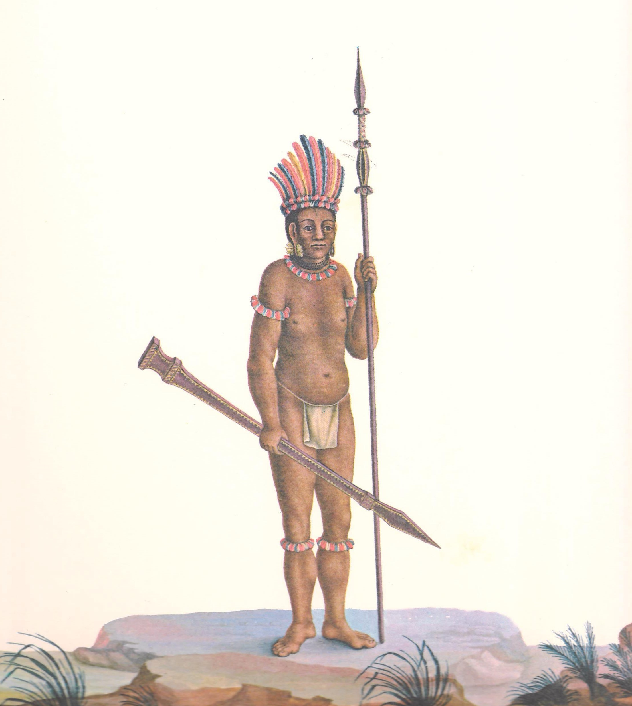 Ilustração em Viagem Filosófica pelas capitanias do Grão Pará, Rio Negro, Mato Grosso e Cuiabá.